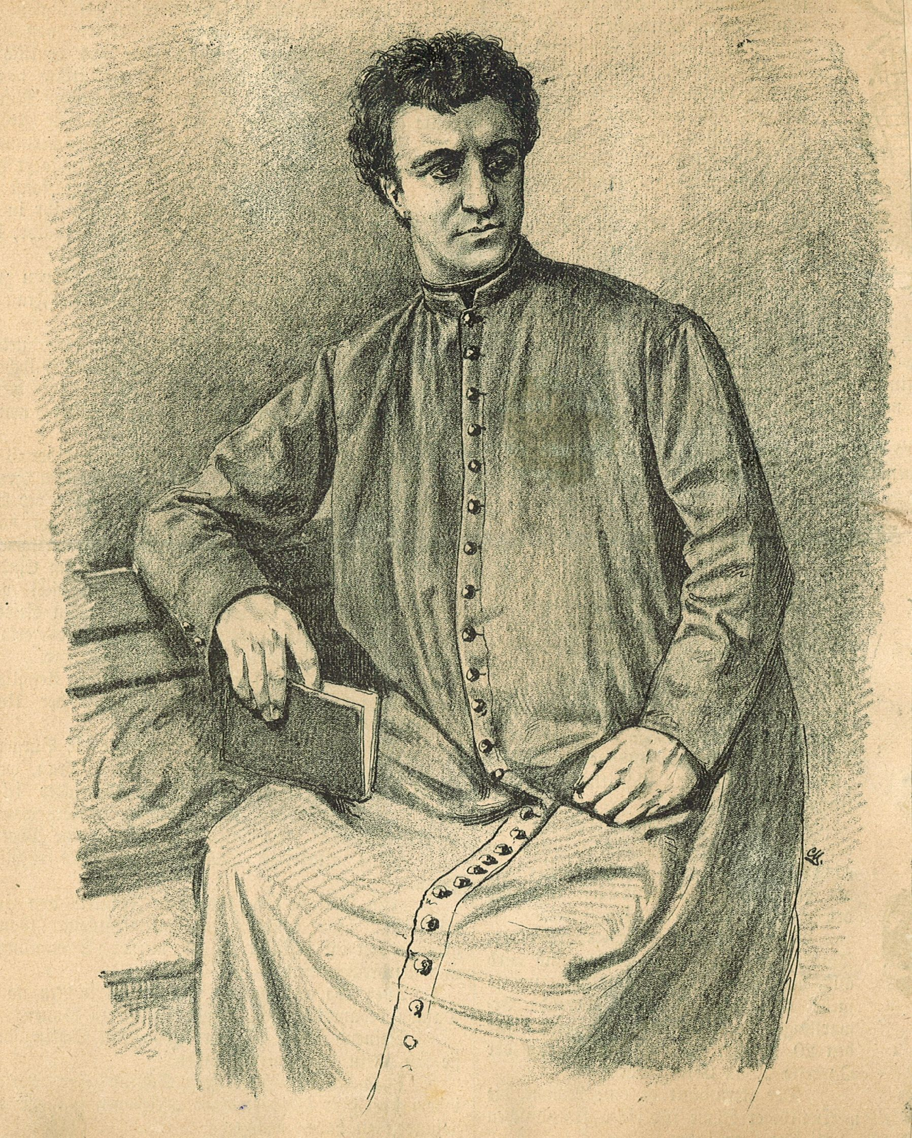 Leopold Lažanský jako Peter Hell v Anzengruberově hře Pfarrer von Kirchfeld